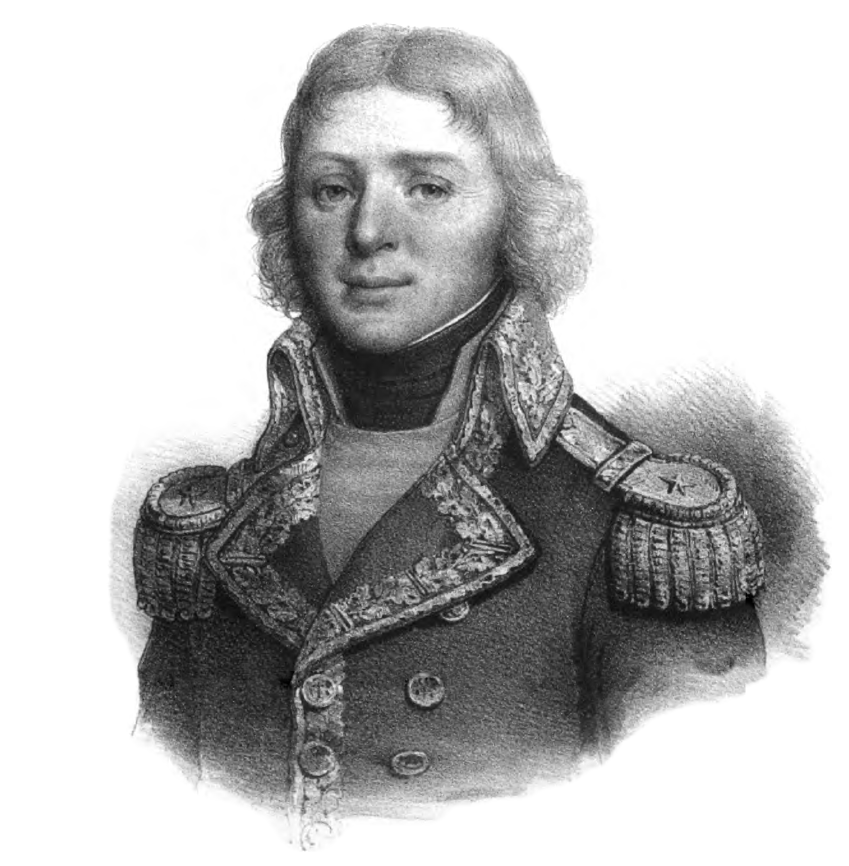 Louis-Jean-Nicolas Lejoille